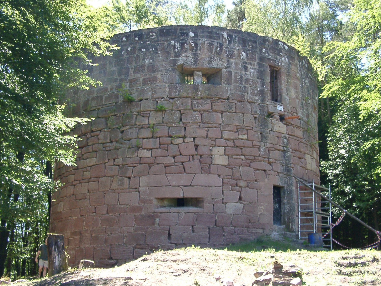 Vorburg Klein-Frankreich vom Berwartstein.